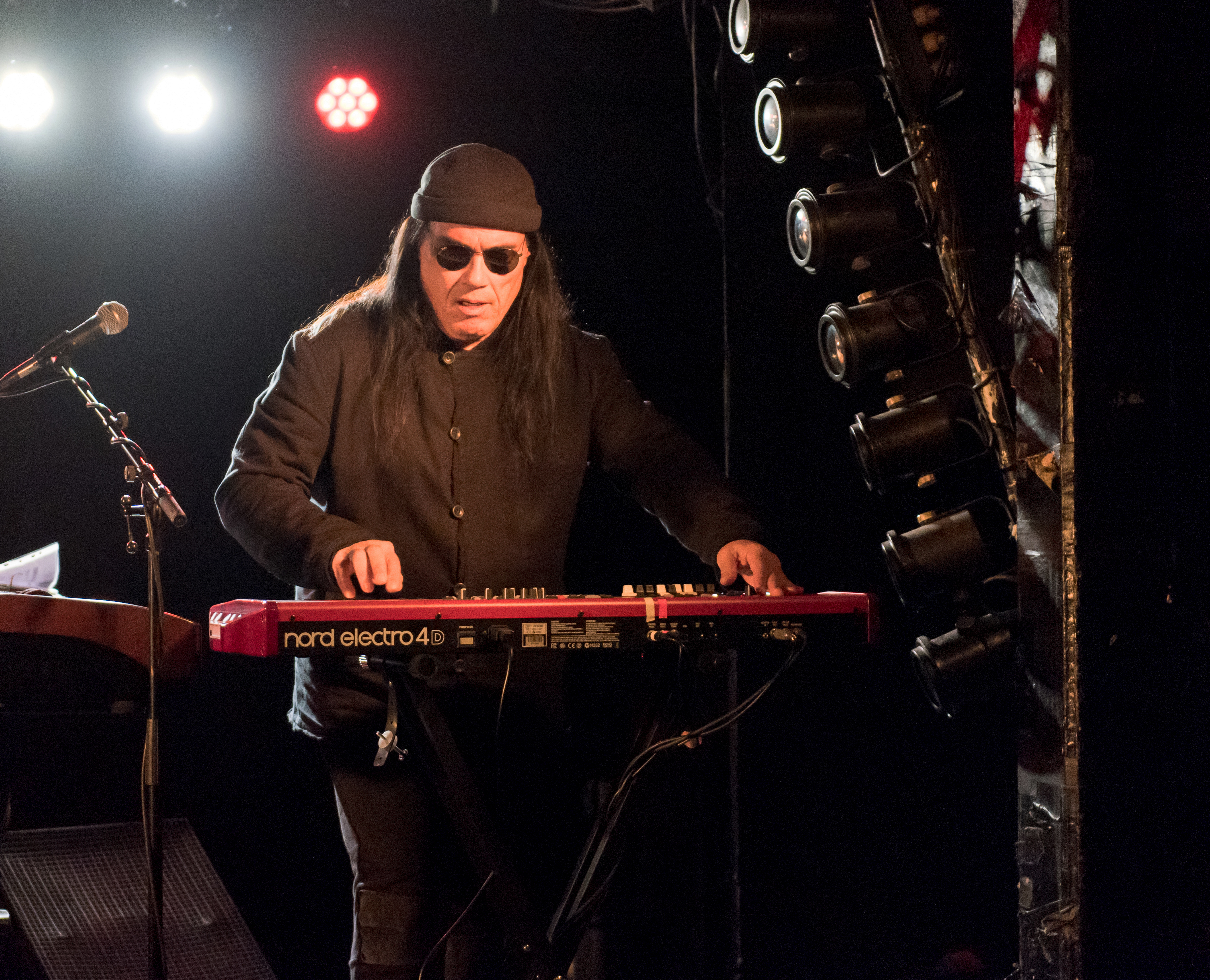 Zöller & Konsorten bei der Flucht nach vorn Tour 2016 im Logo Hamburg